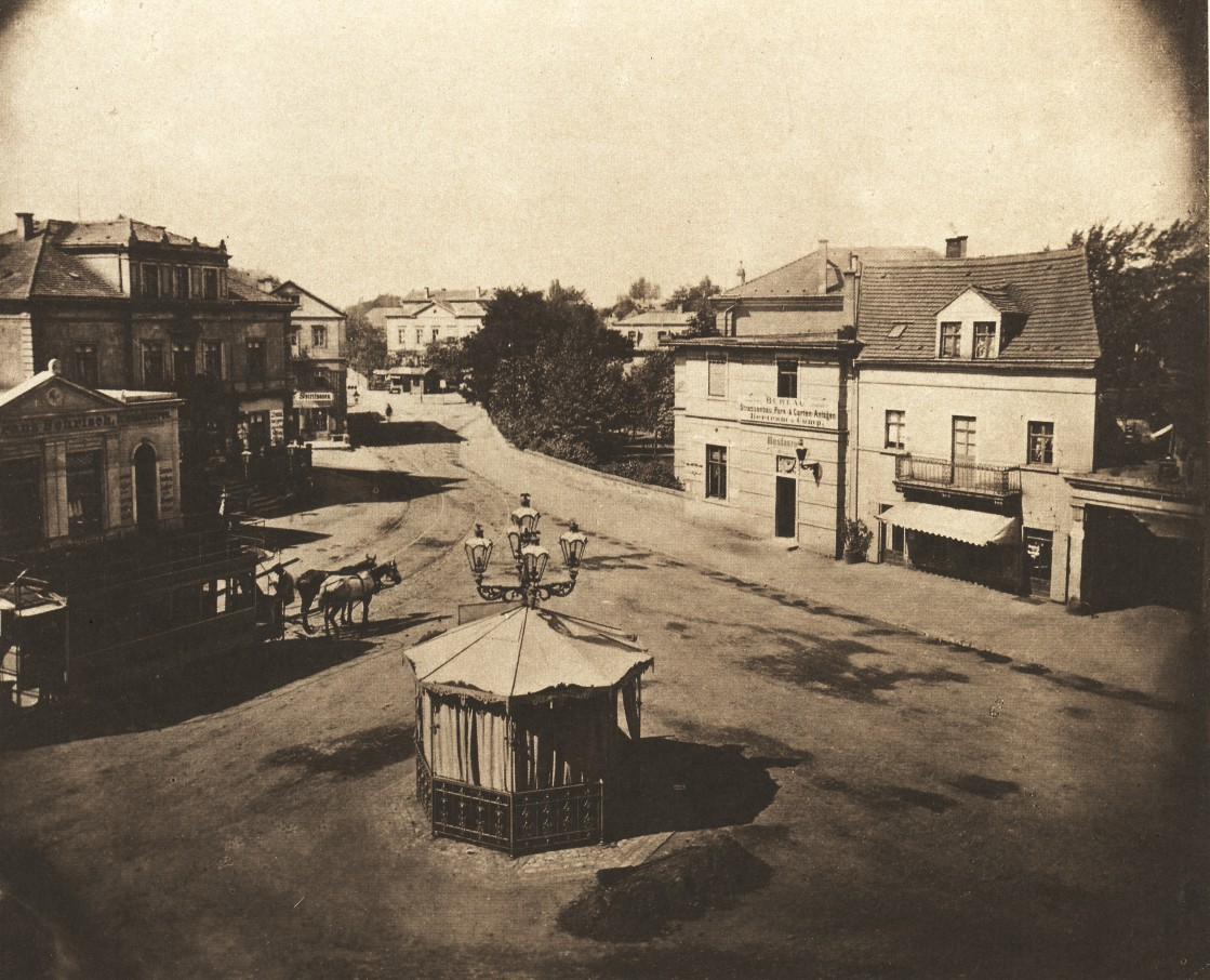 Der Schillerplatz in Blasewitz, zwischen 1872 (Einführung der Pferdebahn) und 1880.